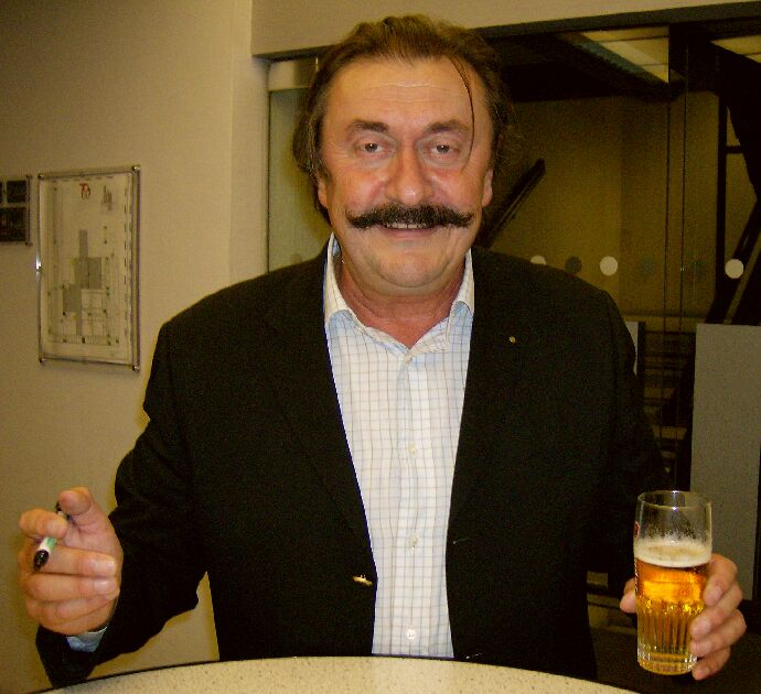 Gemaakt door Tim Freh met de HP Photosmart M525.